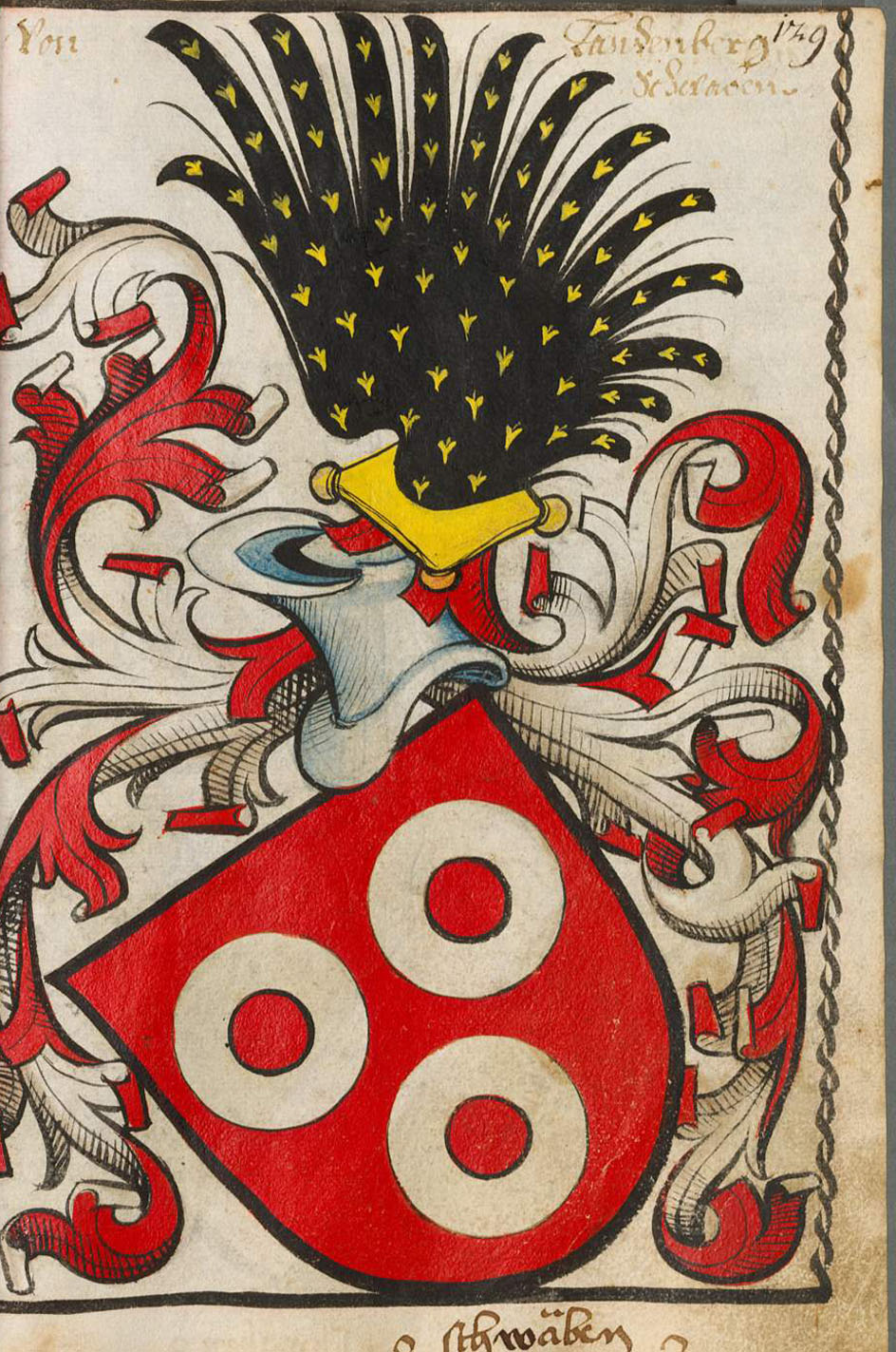 Scheibler'sches Wappenbuch, älterer Teil Seite 129 Landenberg